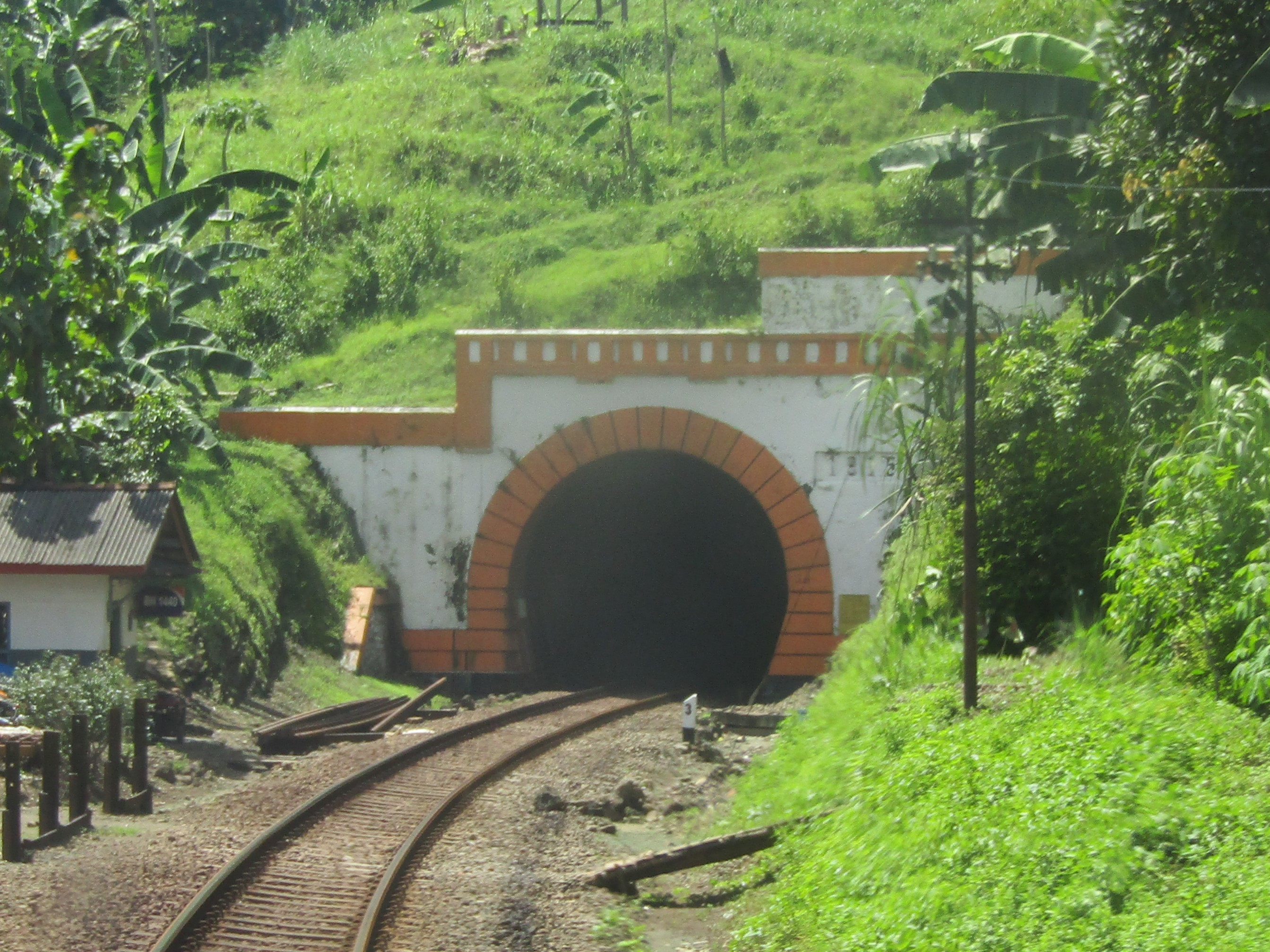 Sisi utara Terowongan Notog, 2019